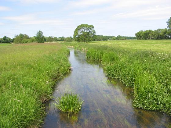 Dömnitz, Fluss in Brandenburg, zwischen Groß Langerwisch und Kuhbier, westlich von Pritzwalk fotografiert im Juni 2005 von Lienhard Schulz